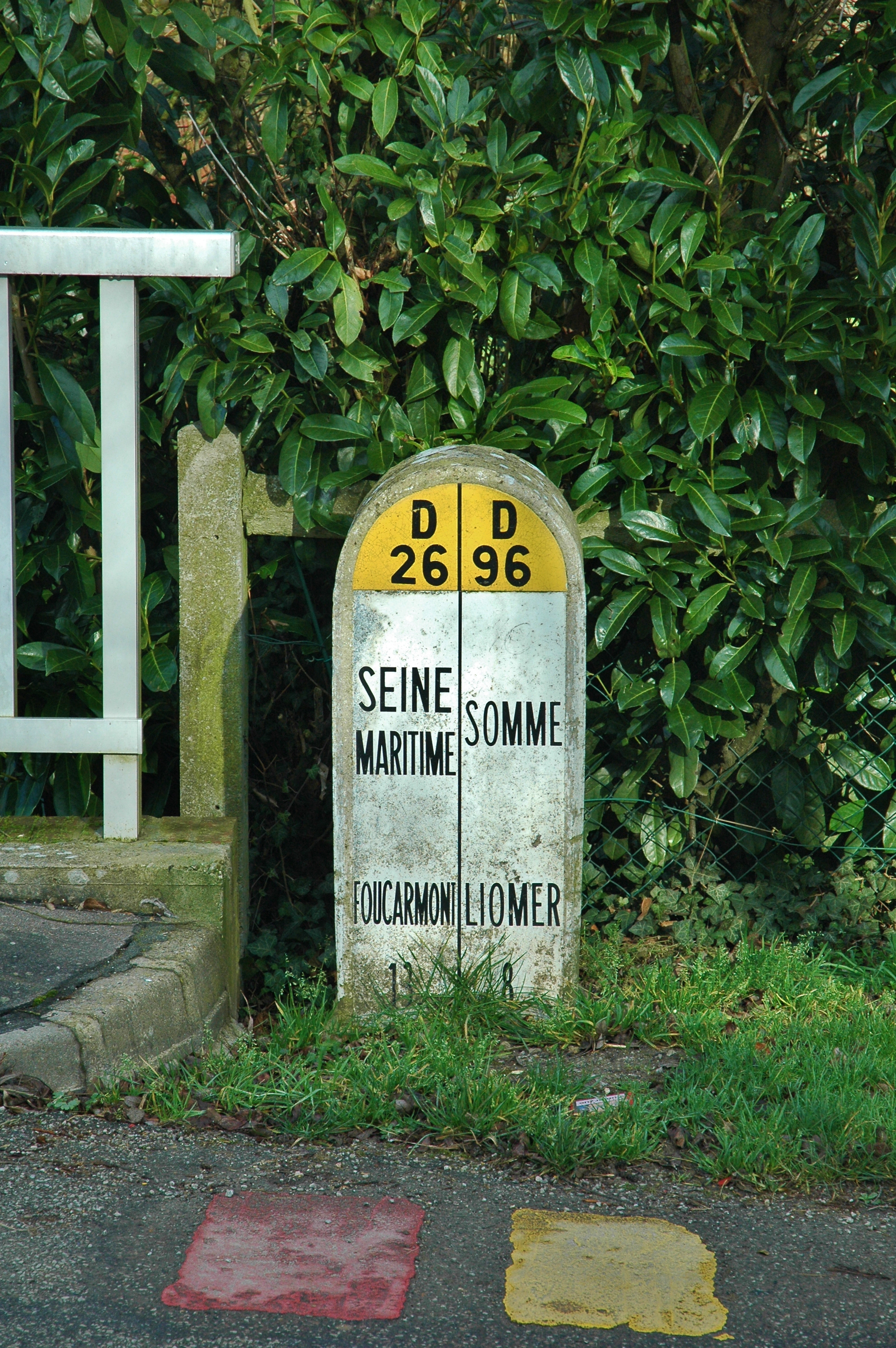 Vieux-Rouen-sur-Bresle (Seine-Maritime, France). Borne délimitant les 2 départements.